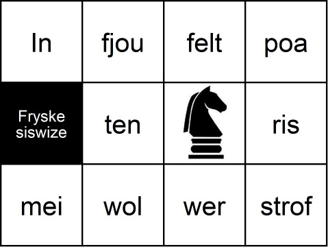 Voorbeeld van een Friese paardensprongpuzzel